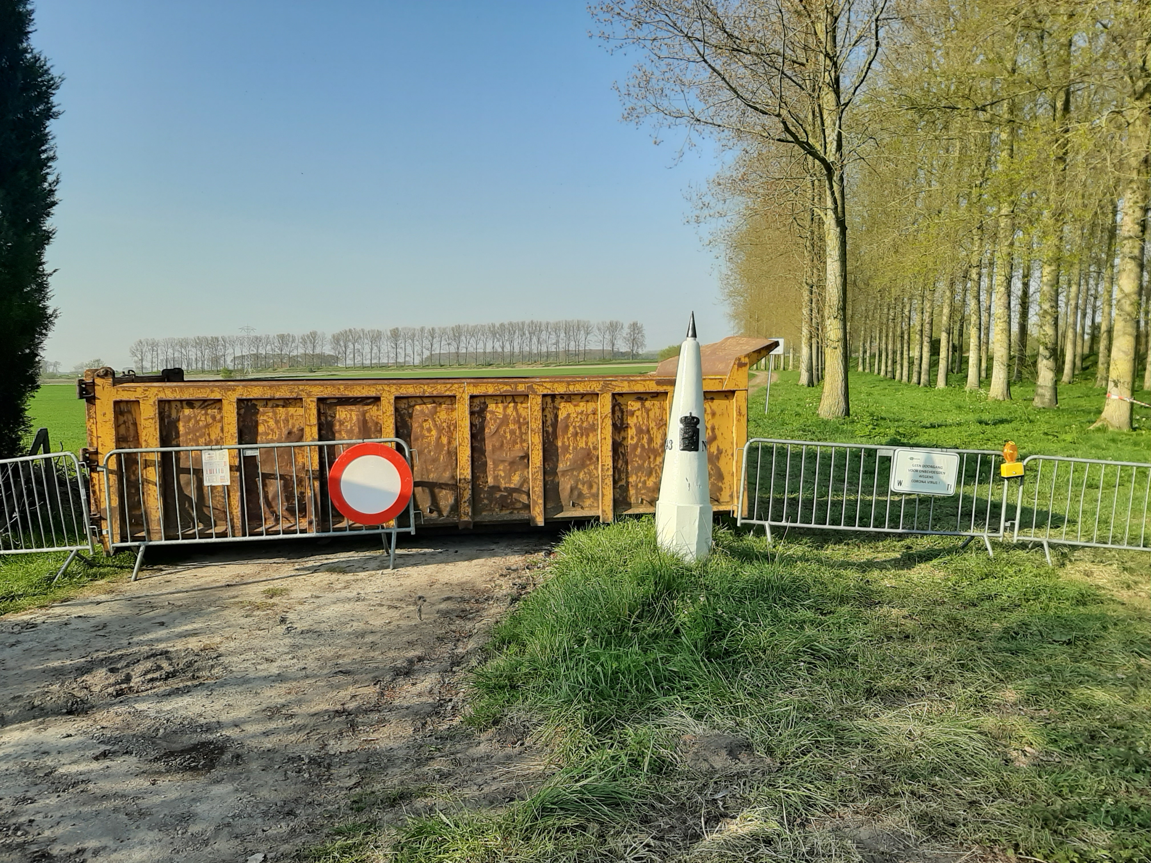 Grenssluiting als een van de maatregelen tegen het Coronavirus, COVID-19. Foto genomen op grensovergang te Haven, Boekhoute (België) en Clarapolder, Philippine (Nederland) op 09-04-2020